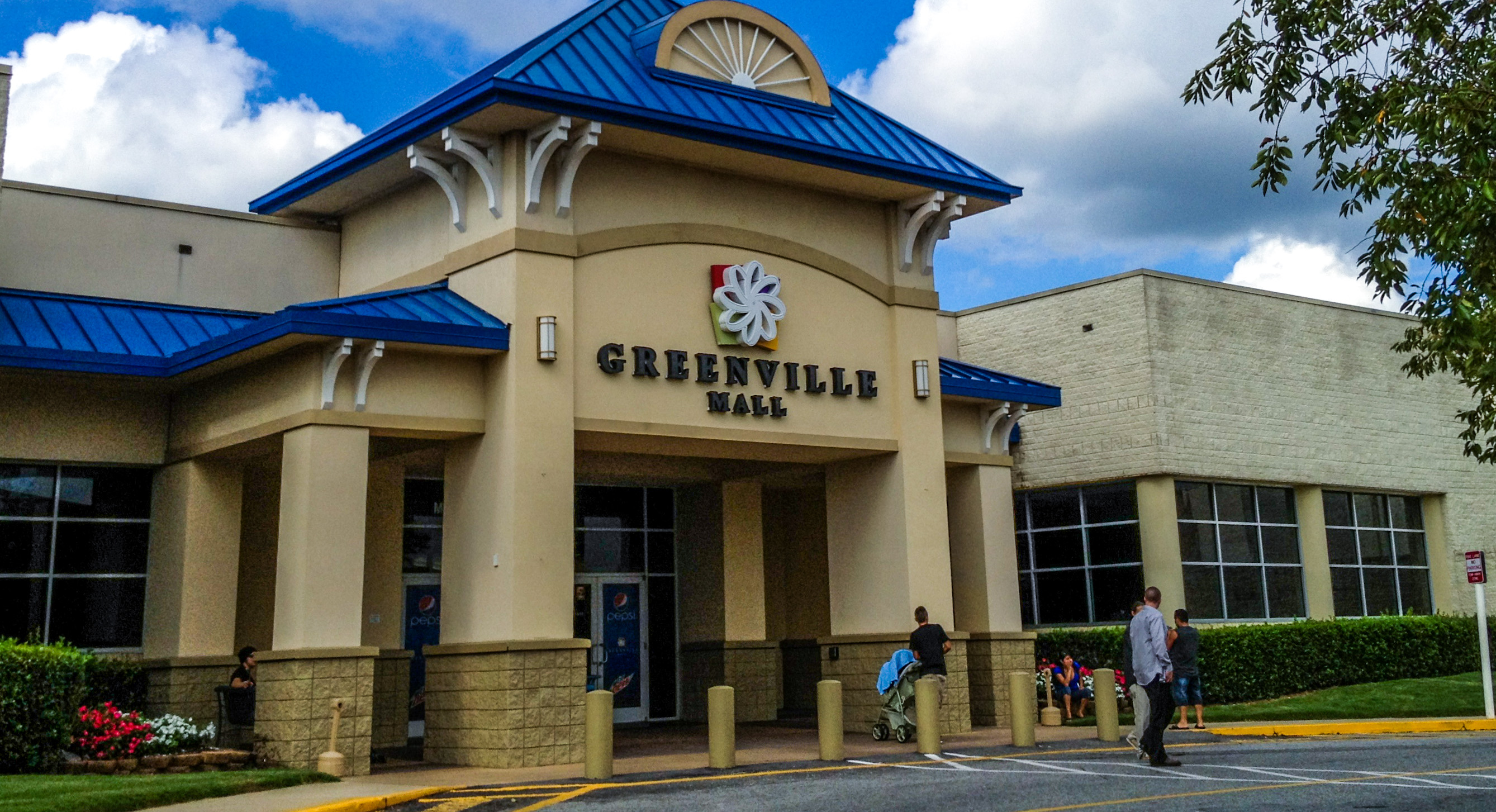 Greenville Mall